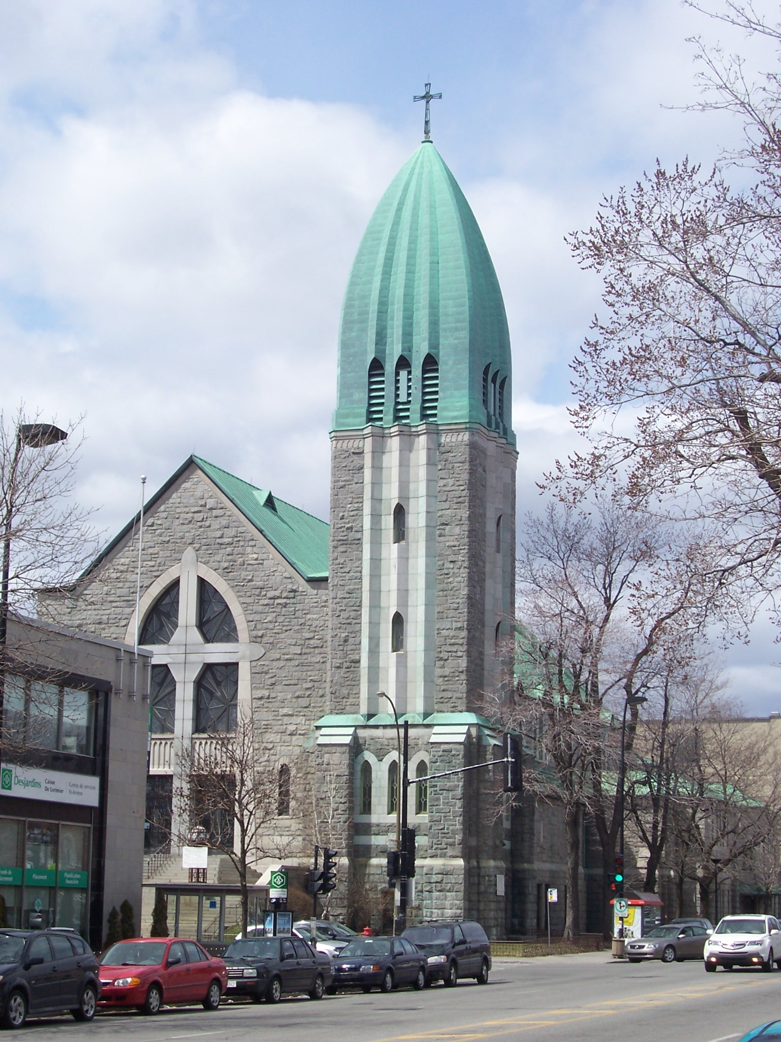 Église Saint-Arsène (Montréal)